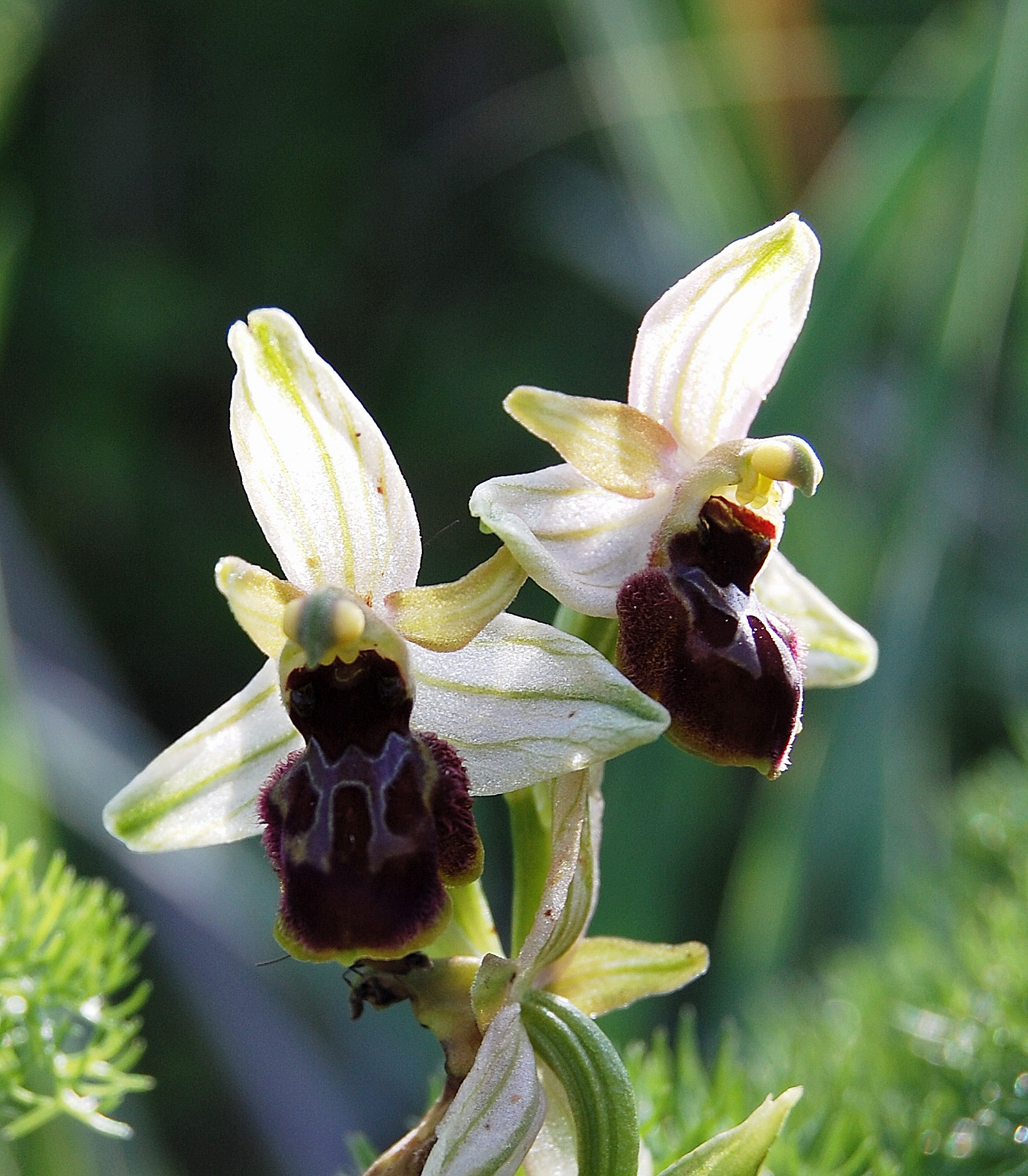 Orchidee dello Zingaro Ophrys exaltata